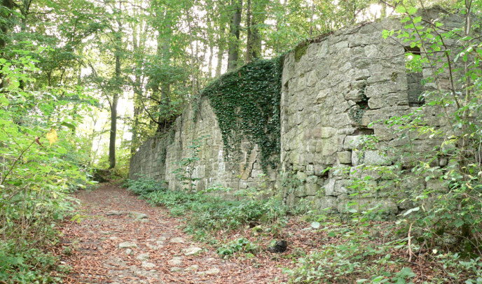 Eingangstor Stauffenburg